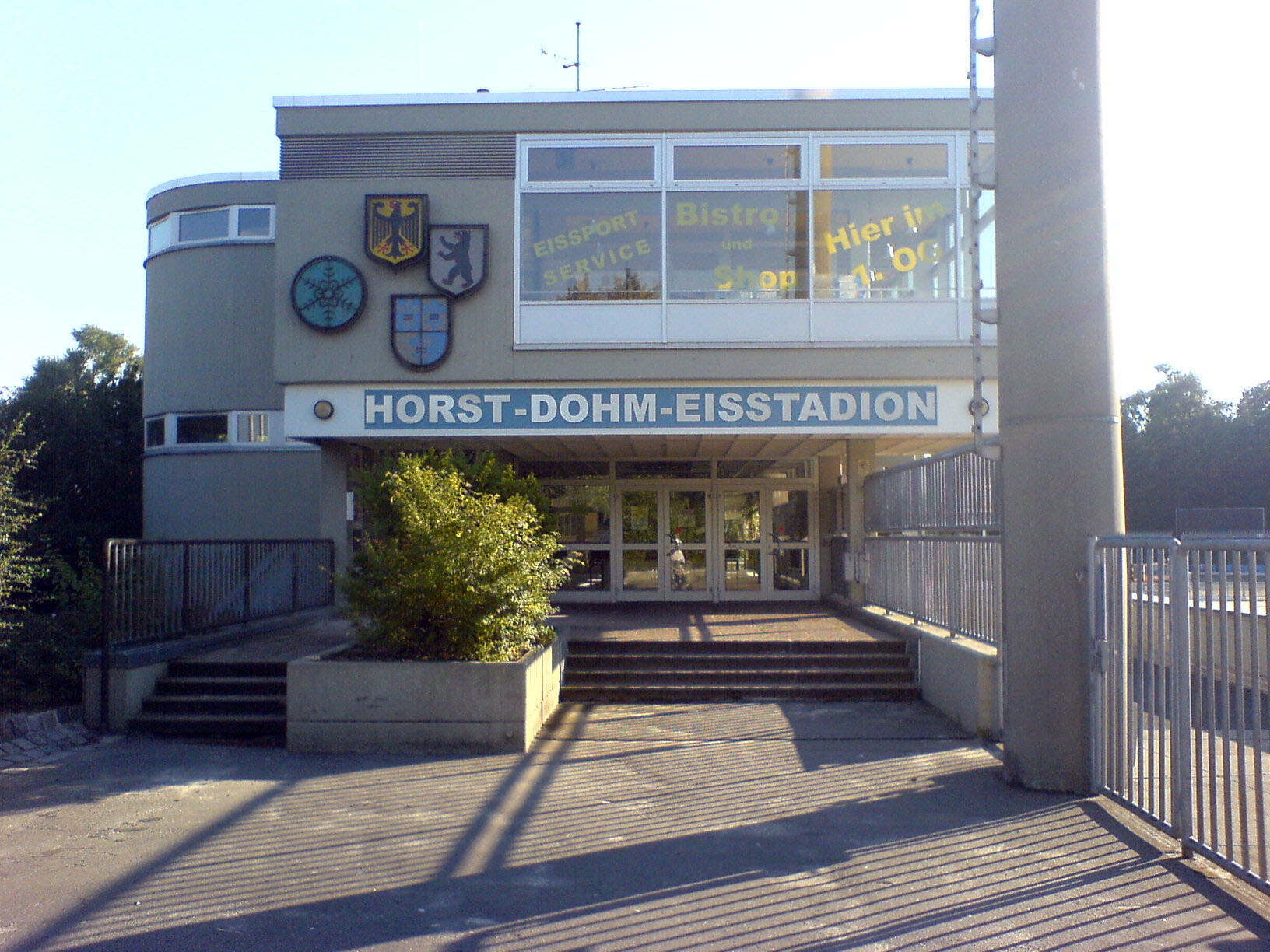 Eingang des Horst-Dohm-Stadions in Berlin